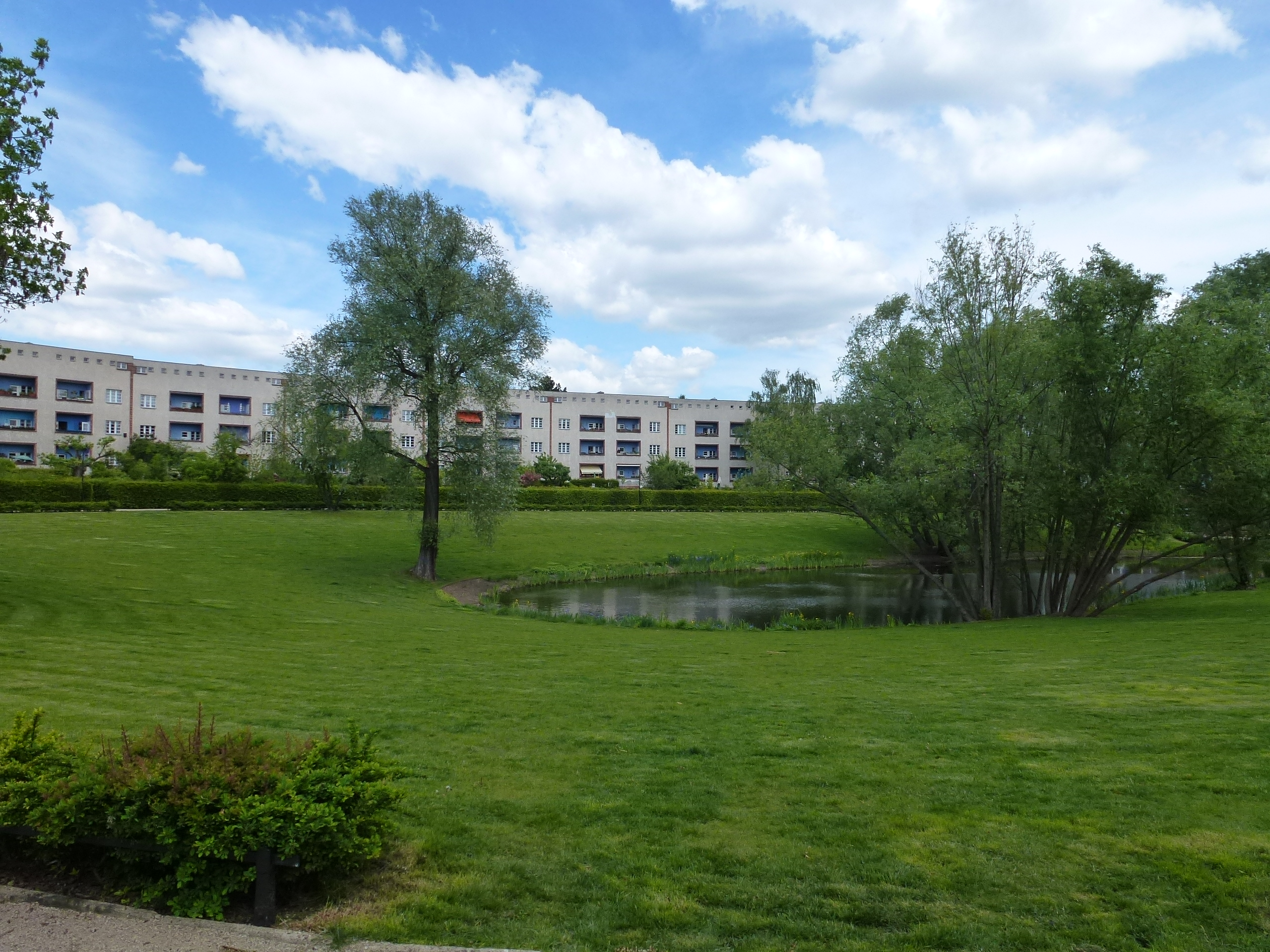 Berlin-Britz Hufeisensiedlung